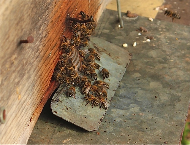 Són les restes de l'esfinx de la calavera (Acherontia atropos), una papallona nocturna molt llépola que sovint intenta entrar dins les caeres. Les abelles ho impedeixen matant-la, recuperant la mel si és que entra, o com en aquest cas aturant-la a la piquera. les restes que no poden retirar són propolitzades. (Abibiloni)